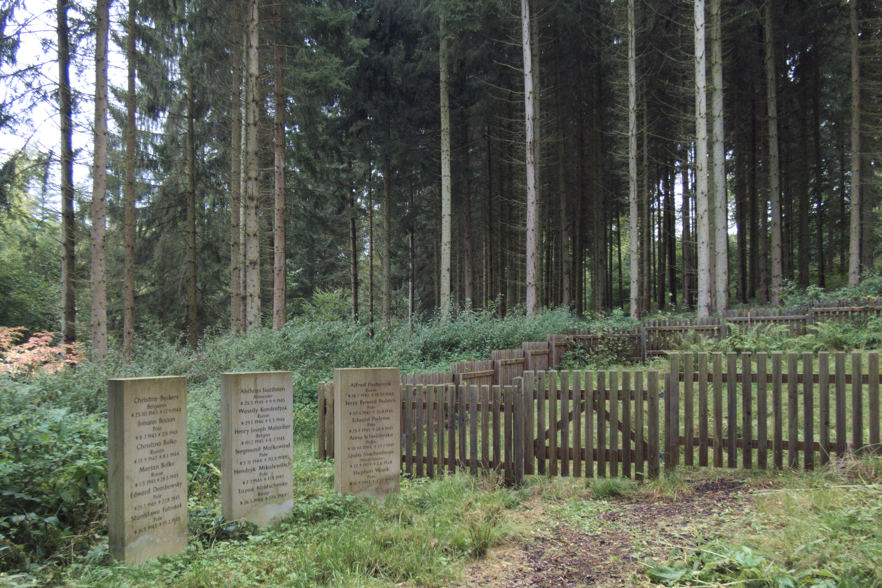 Namensstelen mit den Namen der 18 hier bestatteten ausländischen Kinder am Friedhofstor des Waldfriedhofs Nienstedt in Niedersachsen